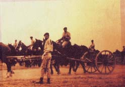 Il Sottotenente Valter Bay con le Voloire nel 1969